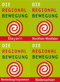 Logo der Landesruppen und dem Landesverband Regionalbewegung NRW